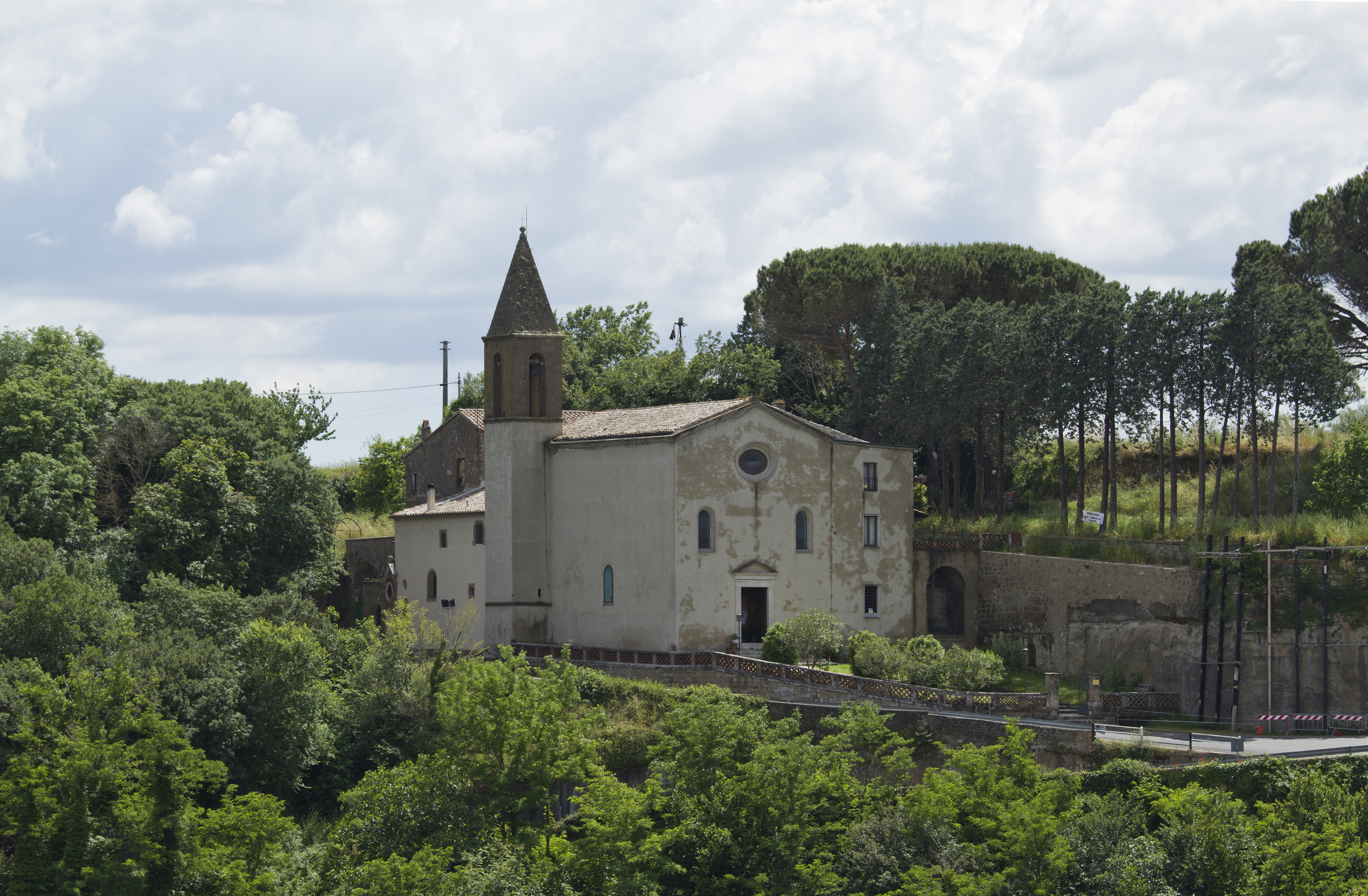 Santuario della Madonna delle Grazie, Pitigliano, Grosseto, Italy